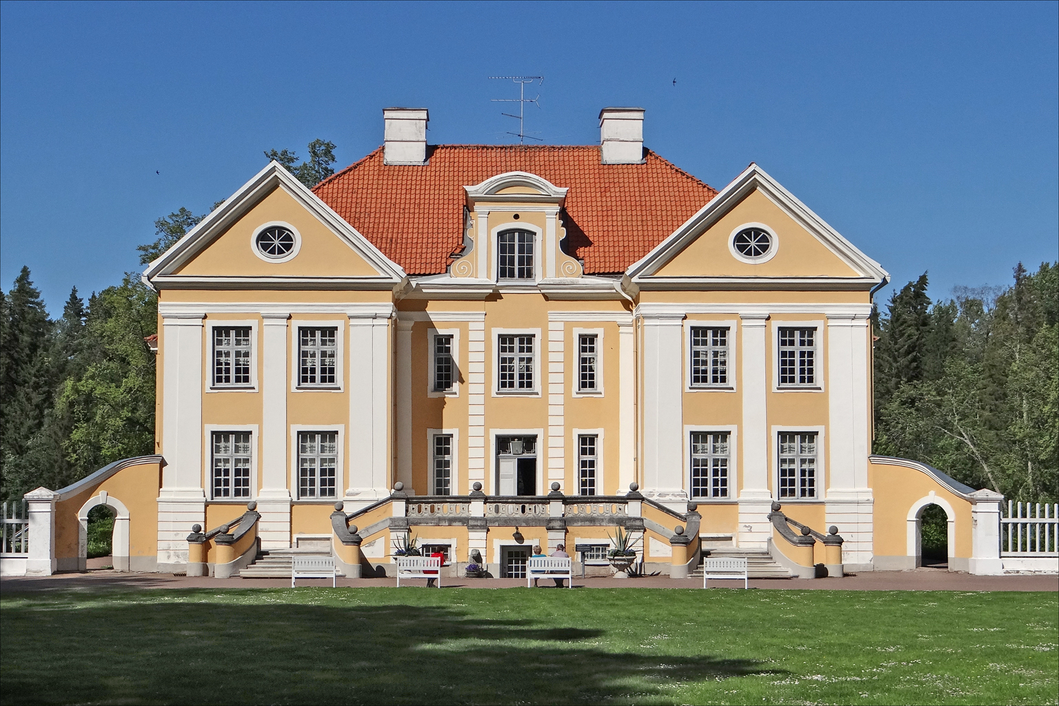 La façade principale du manoir de Palmse